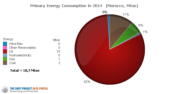 Production d'énergie primaire au Marc (2014)